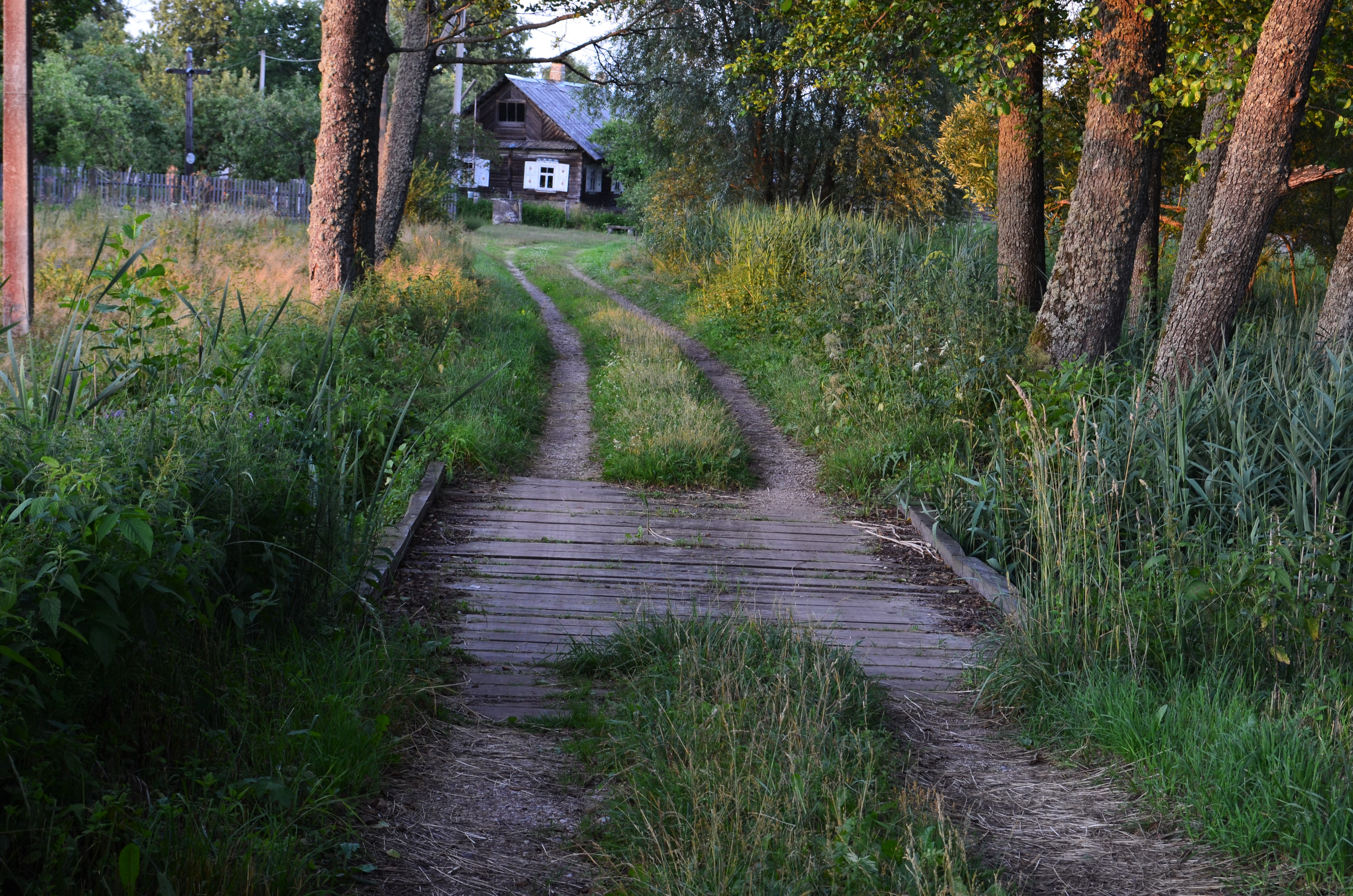 Tilto g., Musteika, Varėnos r.